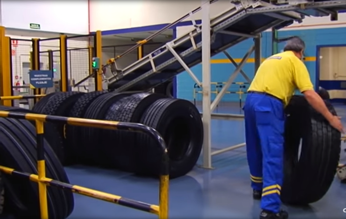 La fábrica de Michelín en Aranda de Duero celebra la fabricación de su neumático 50 millones.